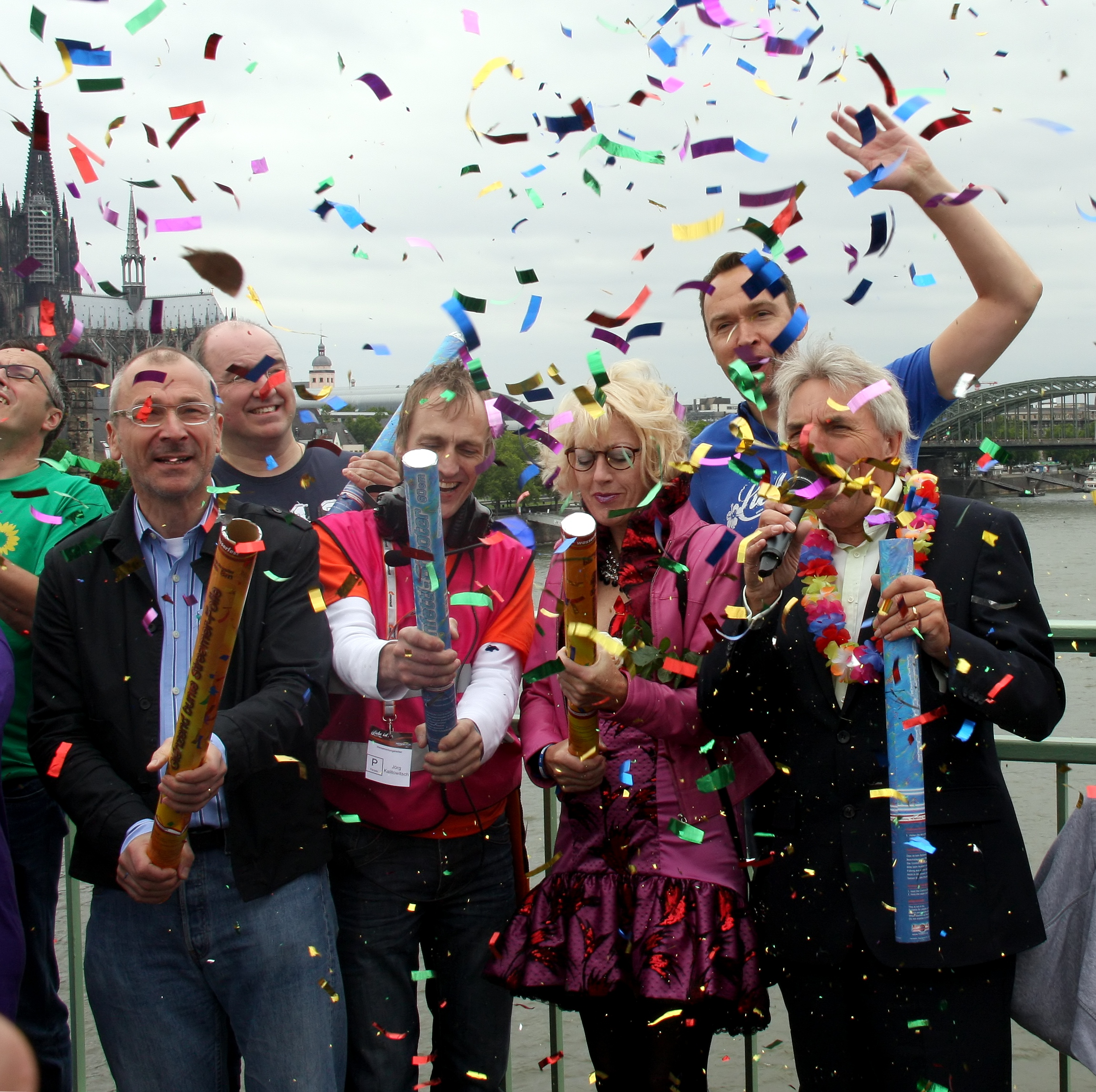 Offizielle Eröffnung der ColognePride-Straßenparade zum Christopher Street Day (CSD). Von links nach rechts: Volker Beck (MdB, Grüne), Ralph Sterck (FDP-Fraktion im Rat der Stadt Köln), Paradeleitung, Elfi Scho-Antwerpes (Bürgermeisterin Köln), Markus Danuser (Vorstandmitglied im Kölner Lesben- und Schwulentag e.V.), Jürgen Roters (Oberbürgermeister Köln)